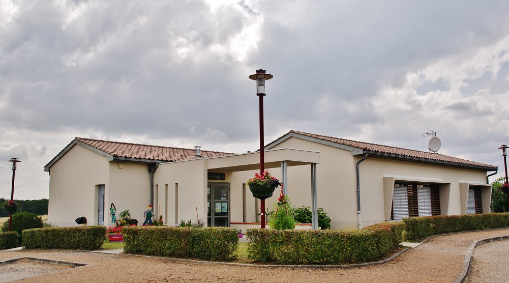 La Mairie